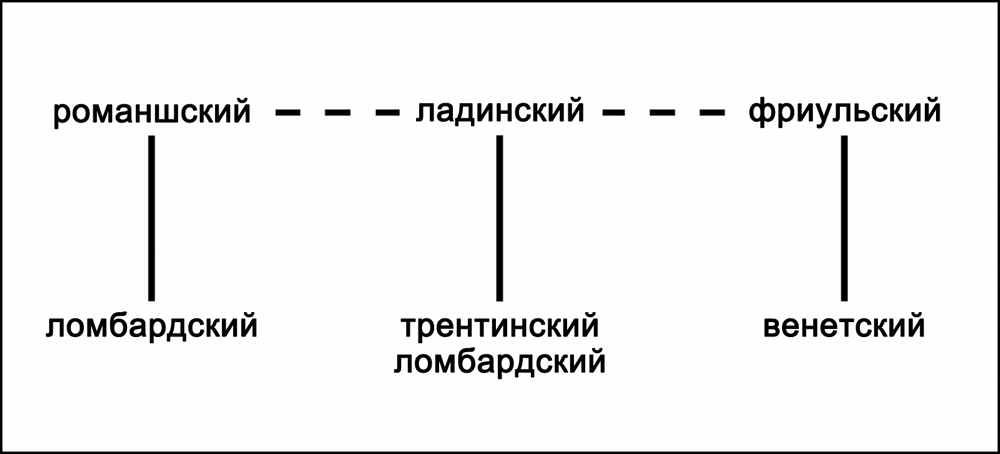 Схема междиалектных и межъязыковых связей в альпийском романском ареале согласно исследованиям Карло Баттисти. Источник: Haiman J., Benincà P. The Rhaeto-Romance Languages. — London, New York: Routledge, 1992. — P. 19. — 240 p. — ISBN 0-415-04194-5.